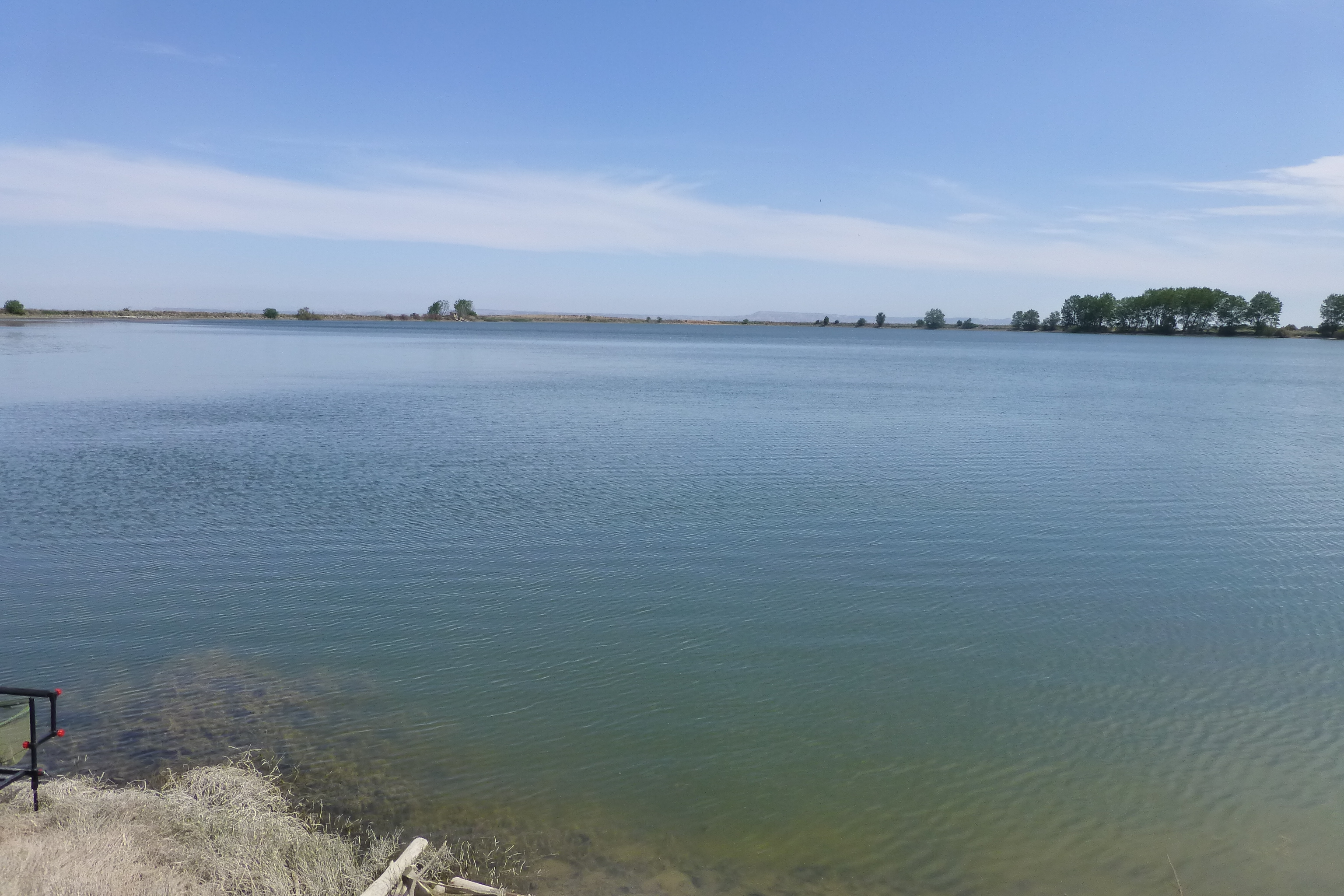 Vista general de la laguna de Lor en Ablitas Navarra (España)